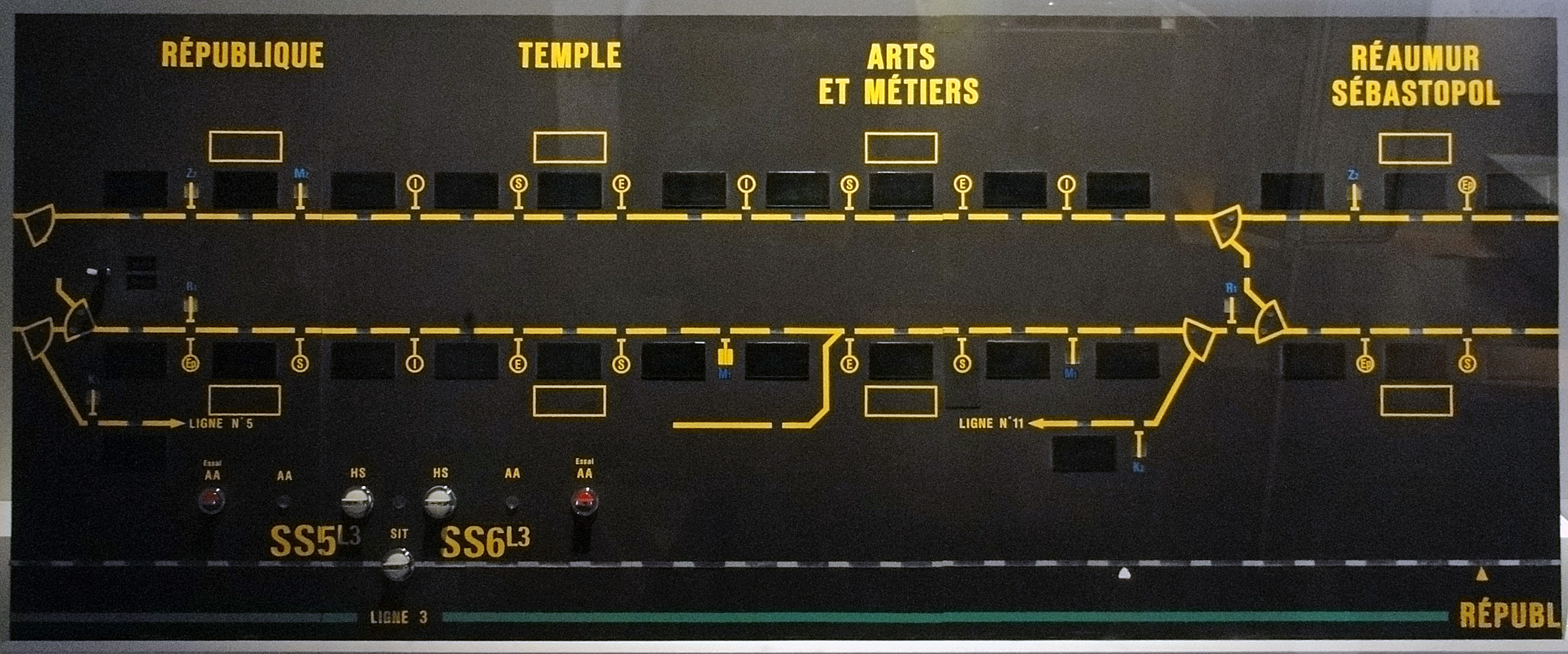 Élément d'un ancien tableau de contrôle optique (TCO) de la ligne 3 du métro de Paris, France.